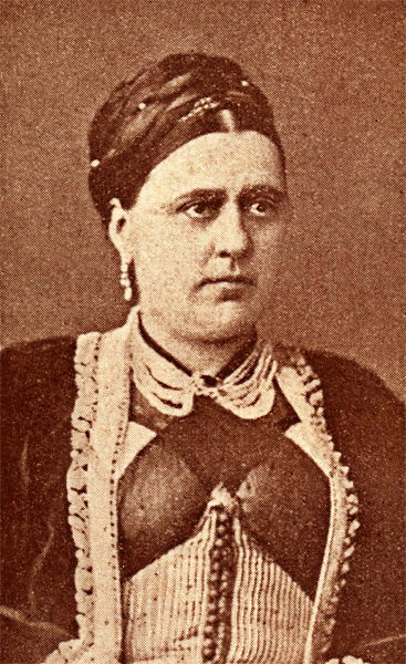 Draginja Petrović, supruga Stanojla Petrovića, veliki ktitor i dobrotvor